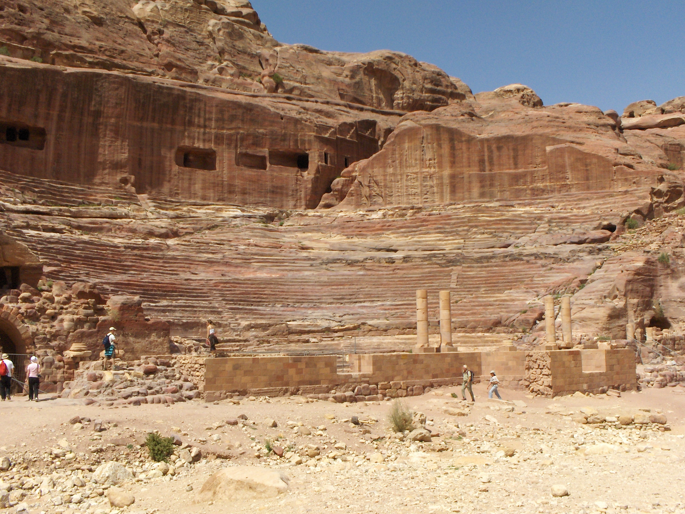 Il teatro di Petra